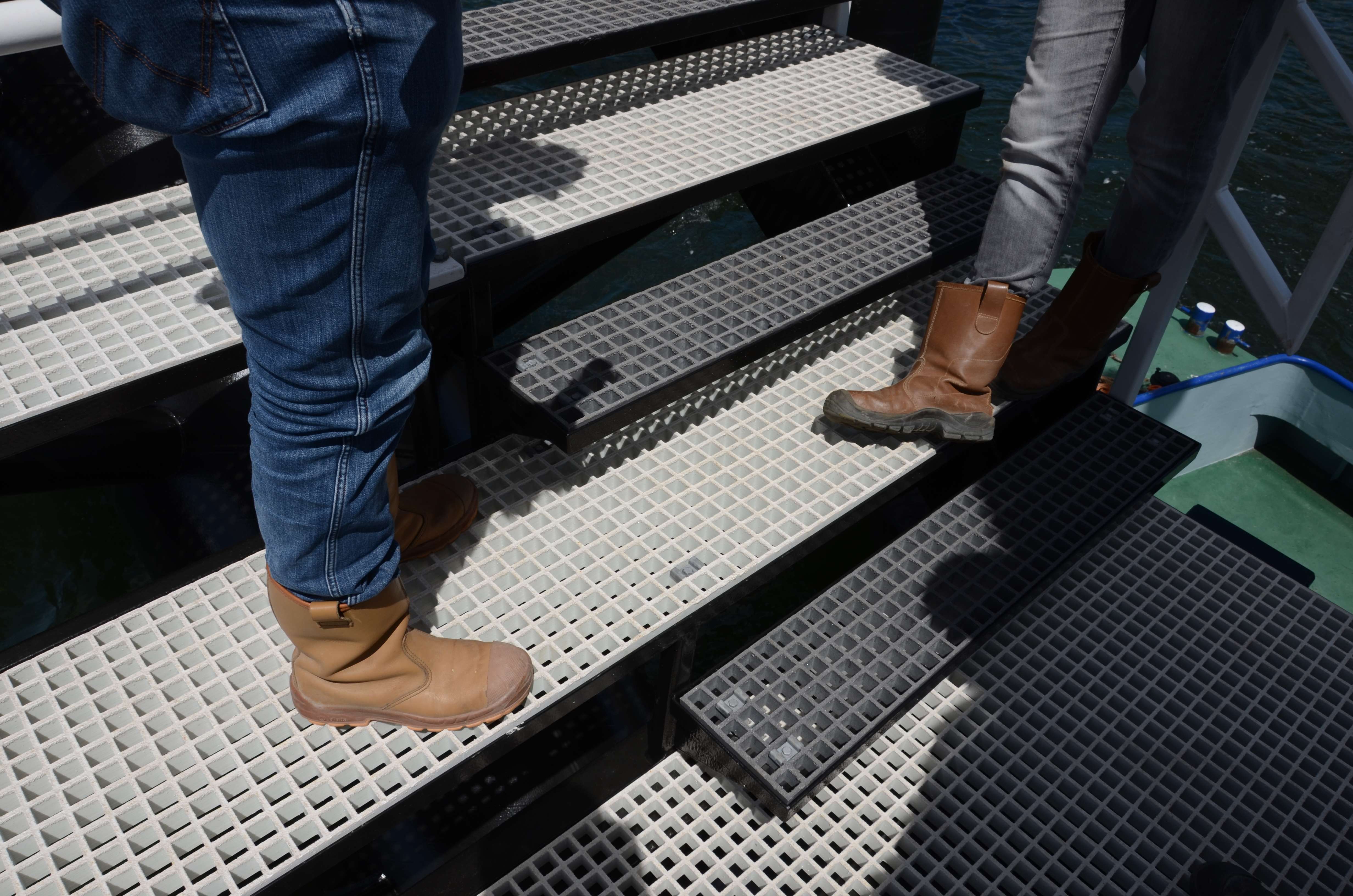 Brede witte trede en smalle zwarte trede van de pianotrap